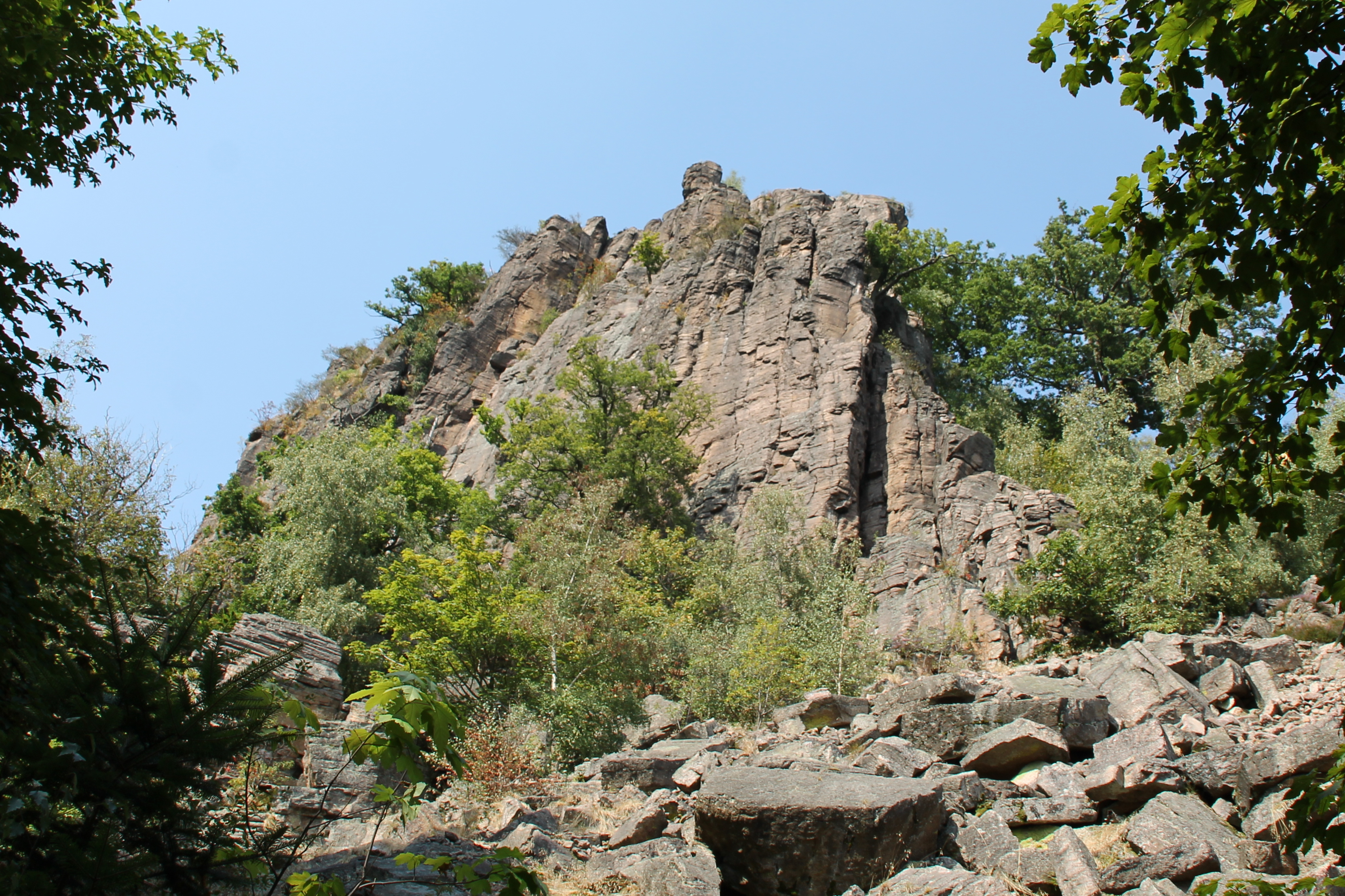 Schöner Blick auf die Battertfelsen (Badener Wand) Baden-Baden; NS:BW-2.054